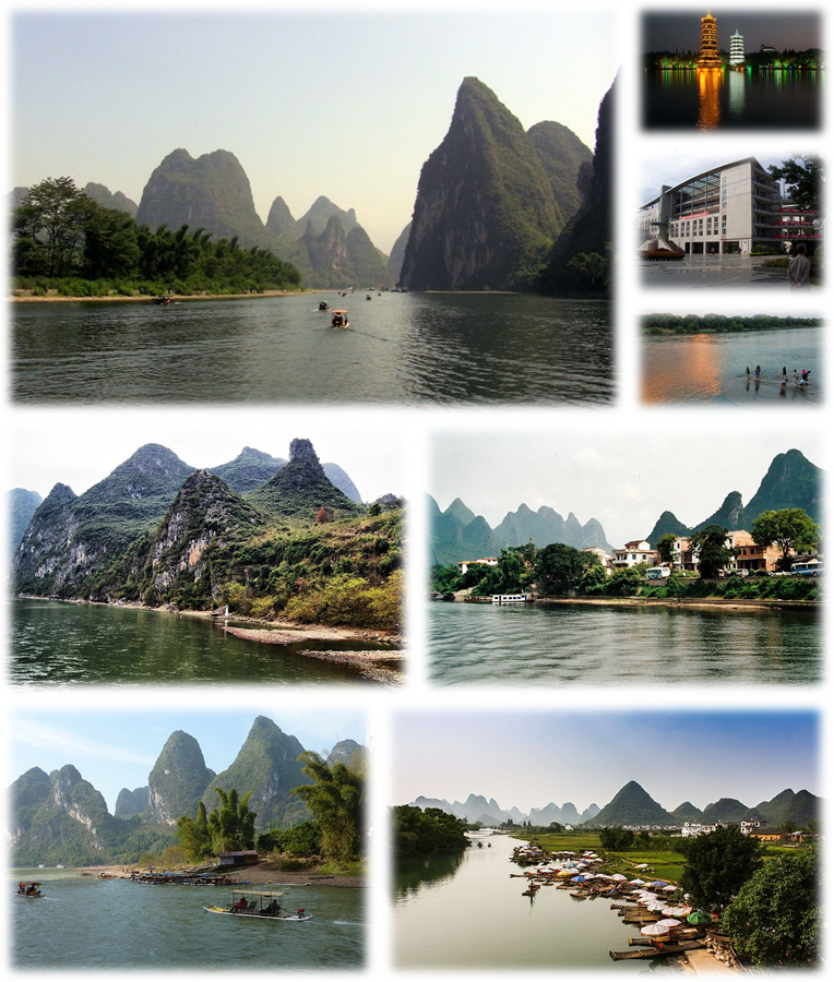 桂林市风光